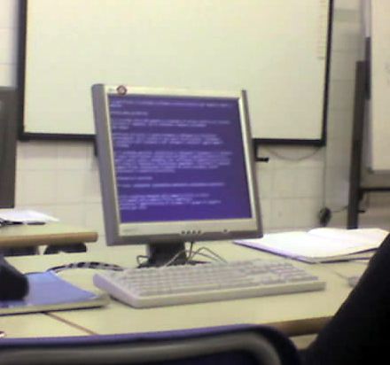 Foto di un pc con visualizzato un Blue Screen of Death.